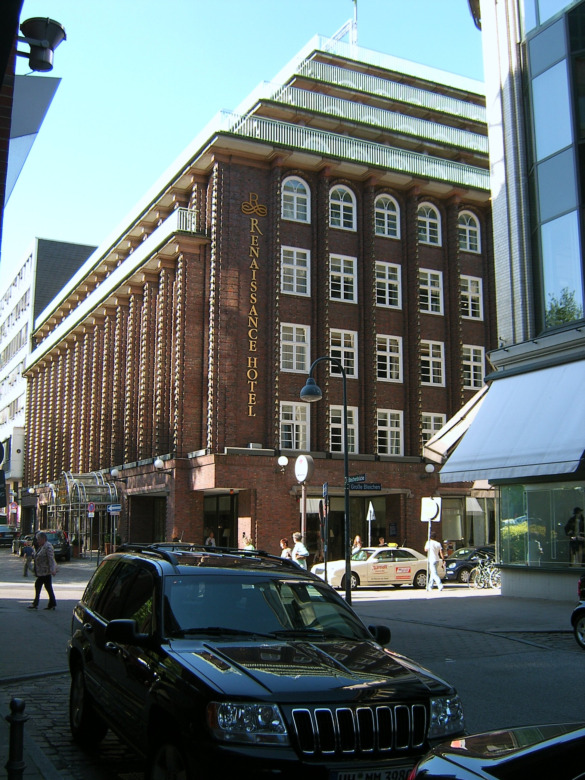 Hamburg, Renaissance-Hotel This is a photograph of an architectural monument.